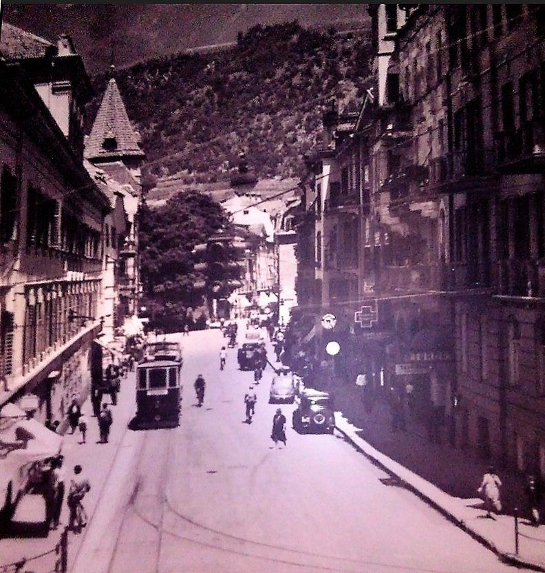 La prima tranvia in Alto Adige a Merano - Lana-Merano